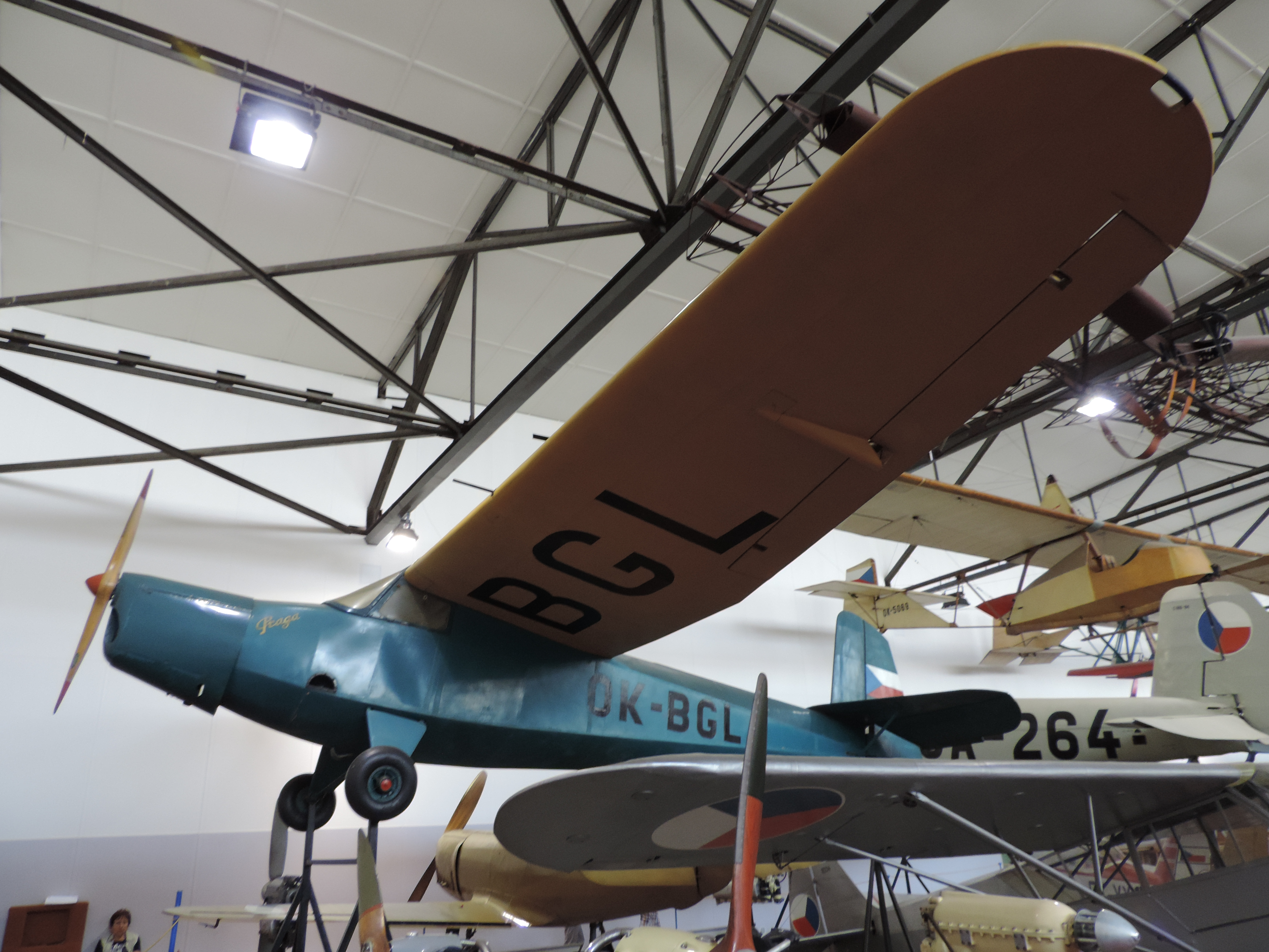 Praga E.114 im Flugzeugmuseum Kbely